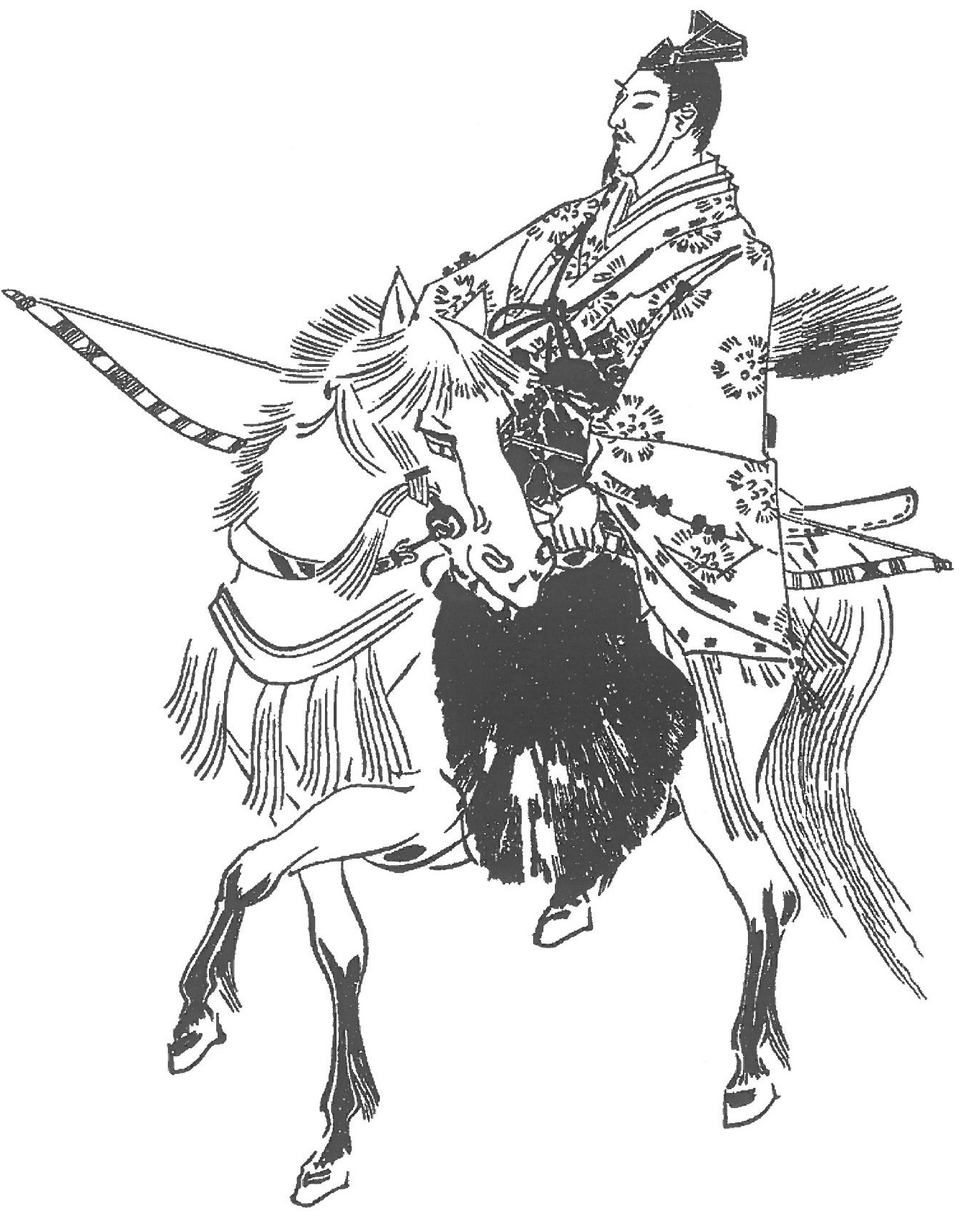 菊池武光像